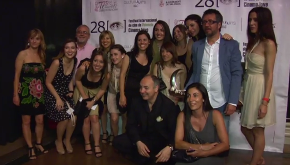 Gala Clausura 28 edició del Festival Cinema Jove